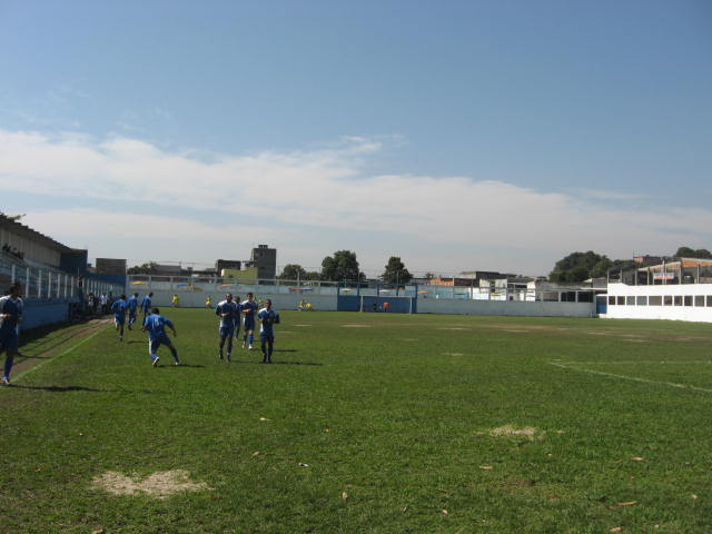 Estádio José Alvarenga, em Heliópolis, Belford Roxo, RJ